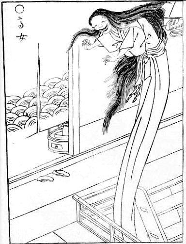 Takajo (高女) from the Gazu Hyakki Yakō